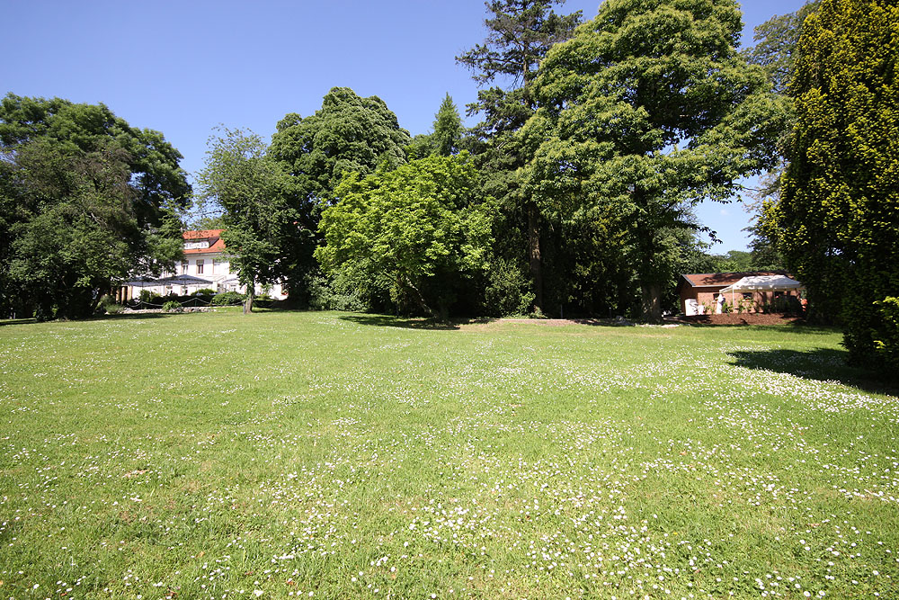 Dippelshof Park